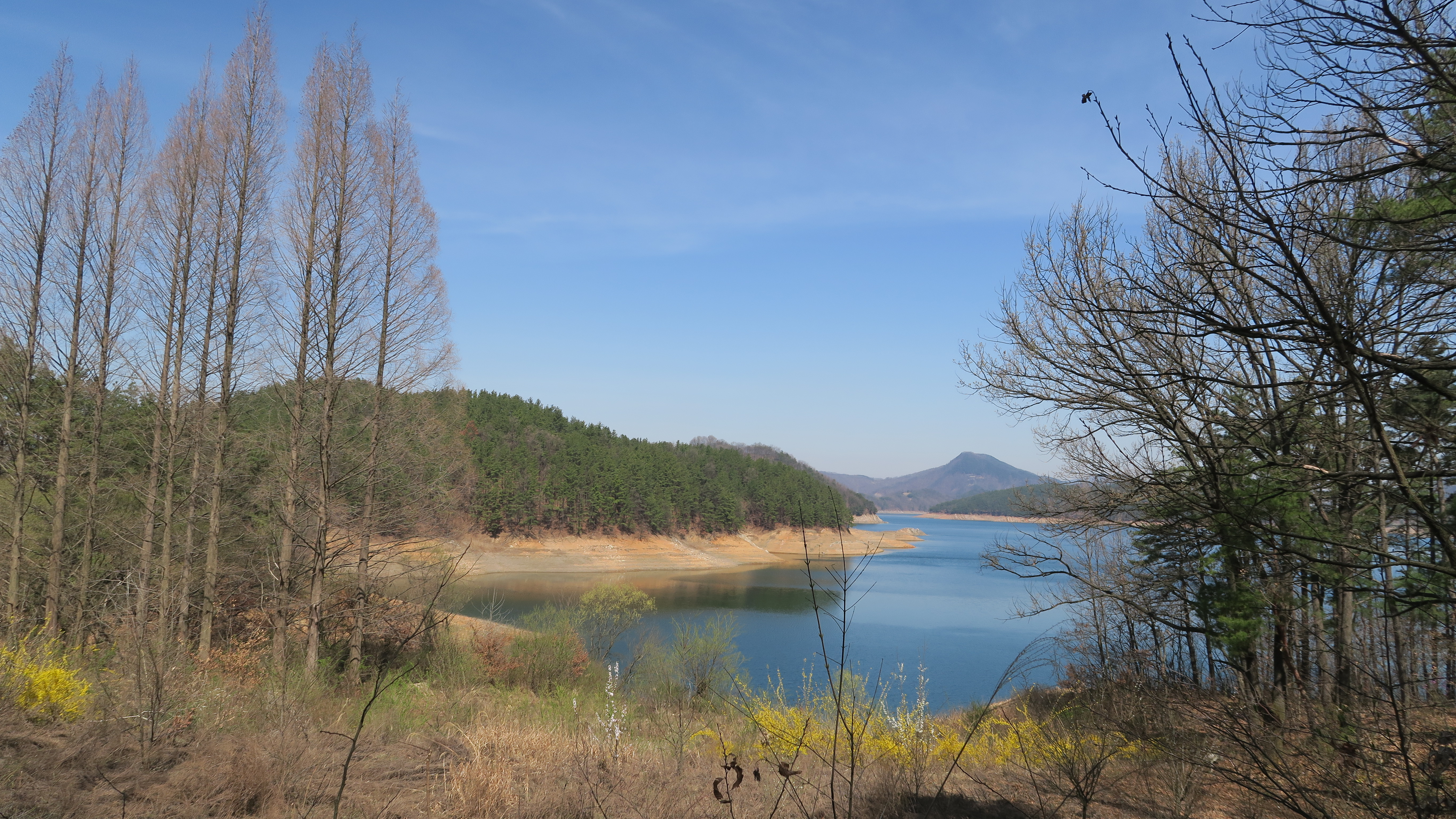 대청호오백리길 2구간_5